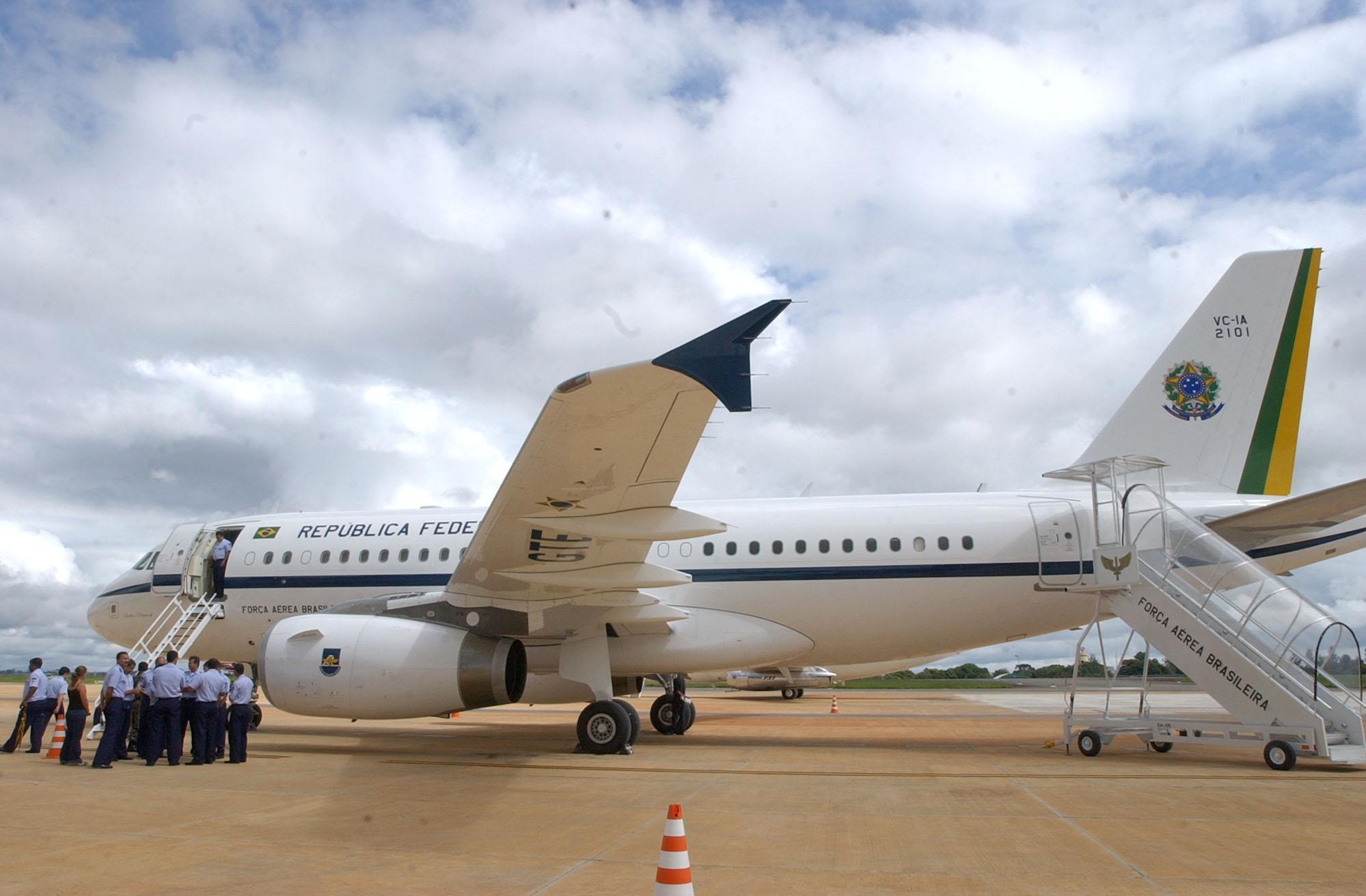 A Aeronave presidencial (FAB 001; Aerolula) brasileira.